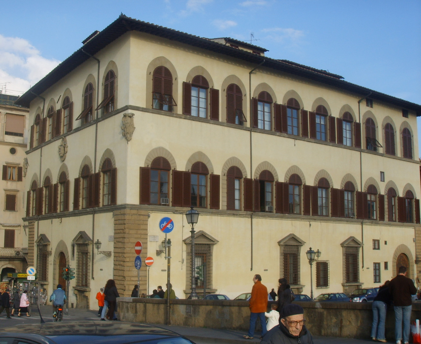 Palazzo_Ricasoli sul Lungarno